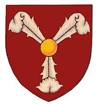 Erb hrabat z Harrachu